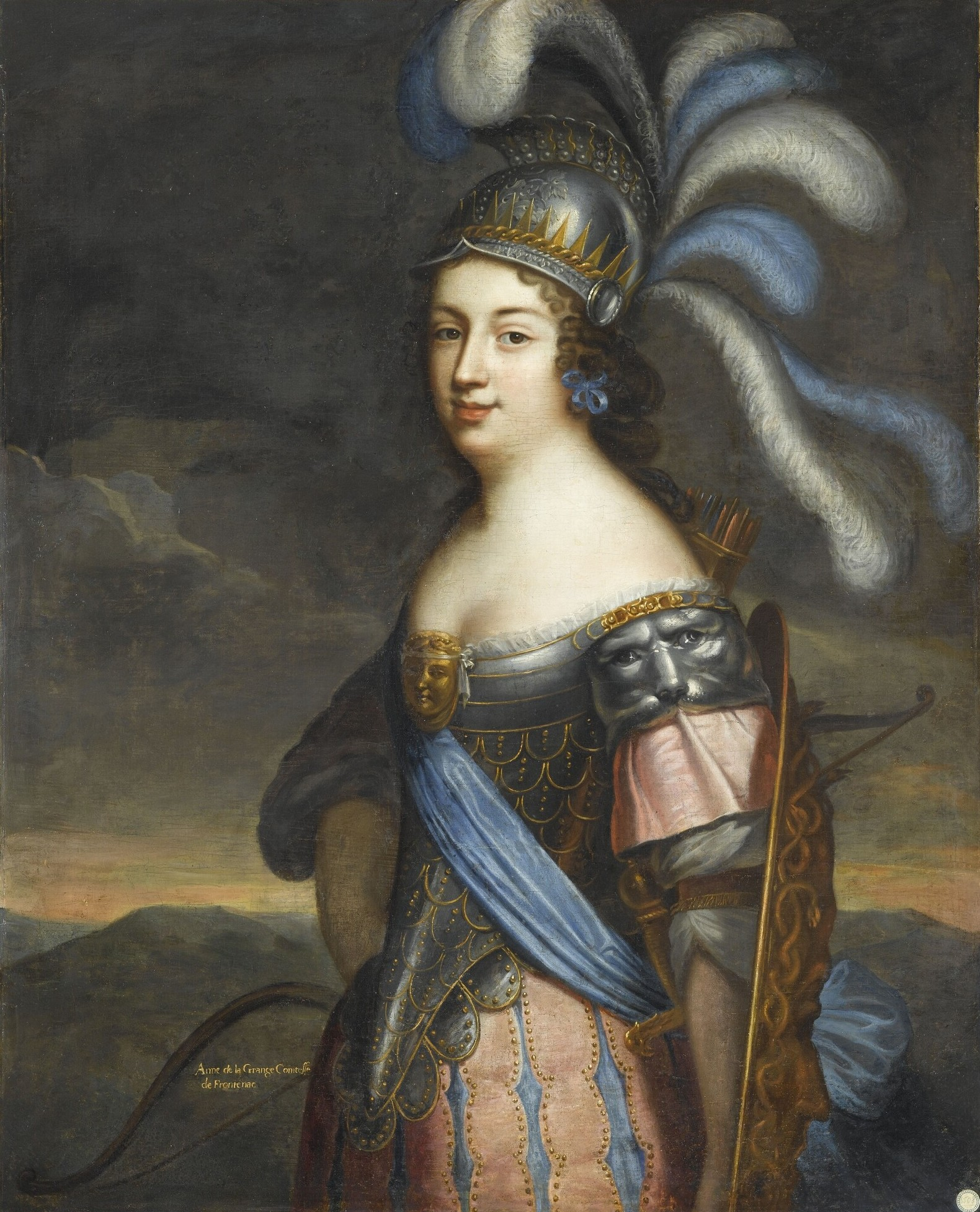 Portrait sans date précise et anonyme : Anne de La Grange-Trianon, comtesse de Frontenac (1632 - 1707).